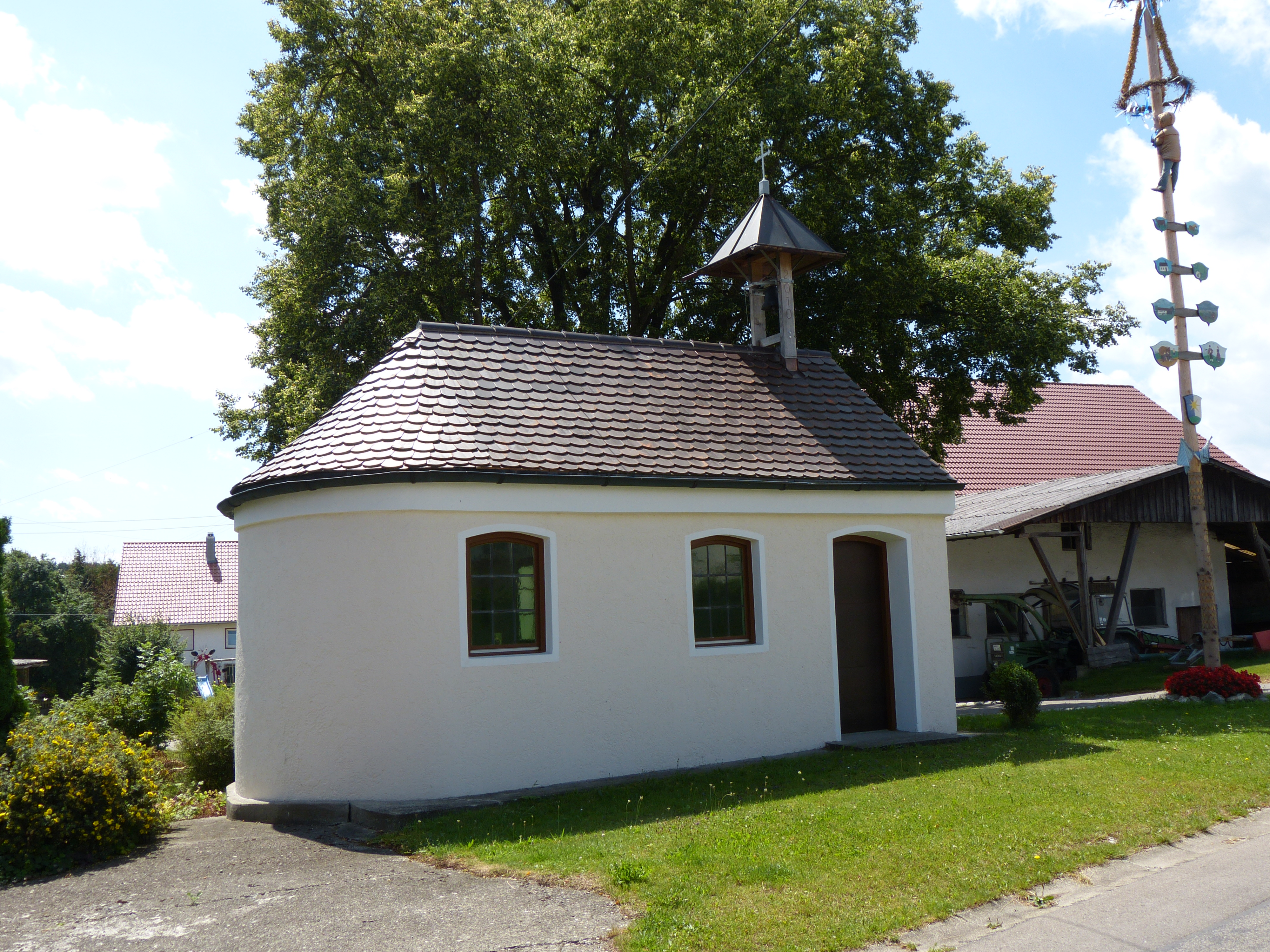 St. Anna, Höllberg, Landkreis Unterallgäu, Bayern